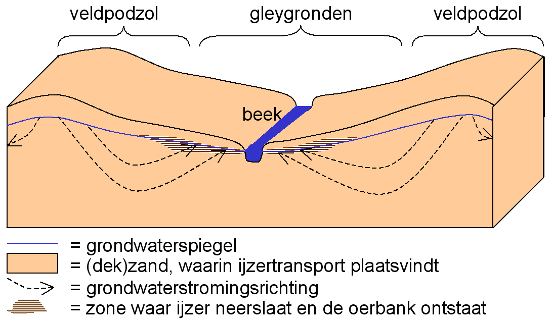 Eigen gemaakt blokdagram ontstaan ijzeroer in gleygronden